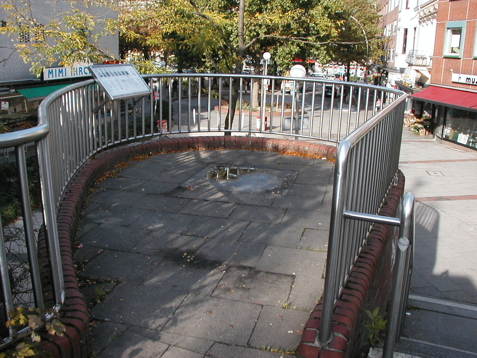 Jochen Gerz, Harburger Mahnmal gegen den Faschismus: Unter diese Platte wurde die Säule versenkt